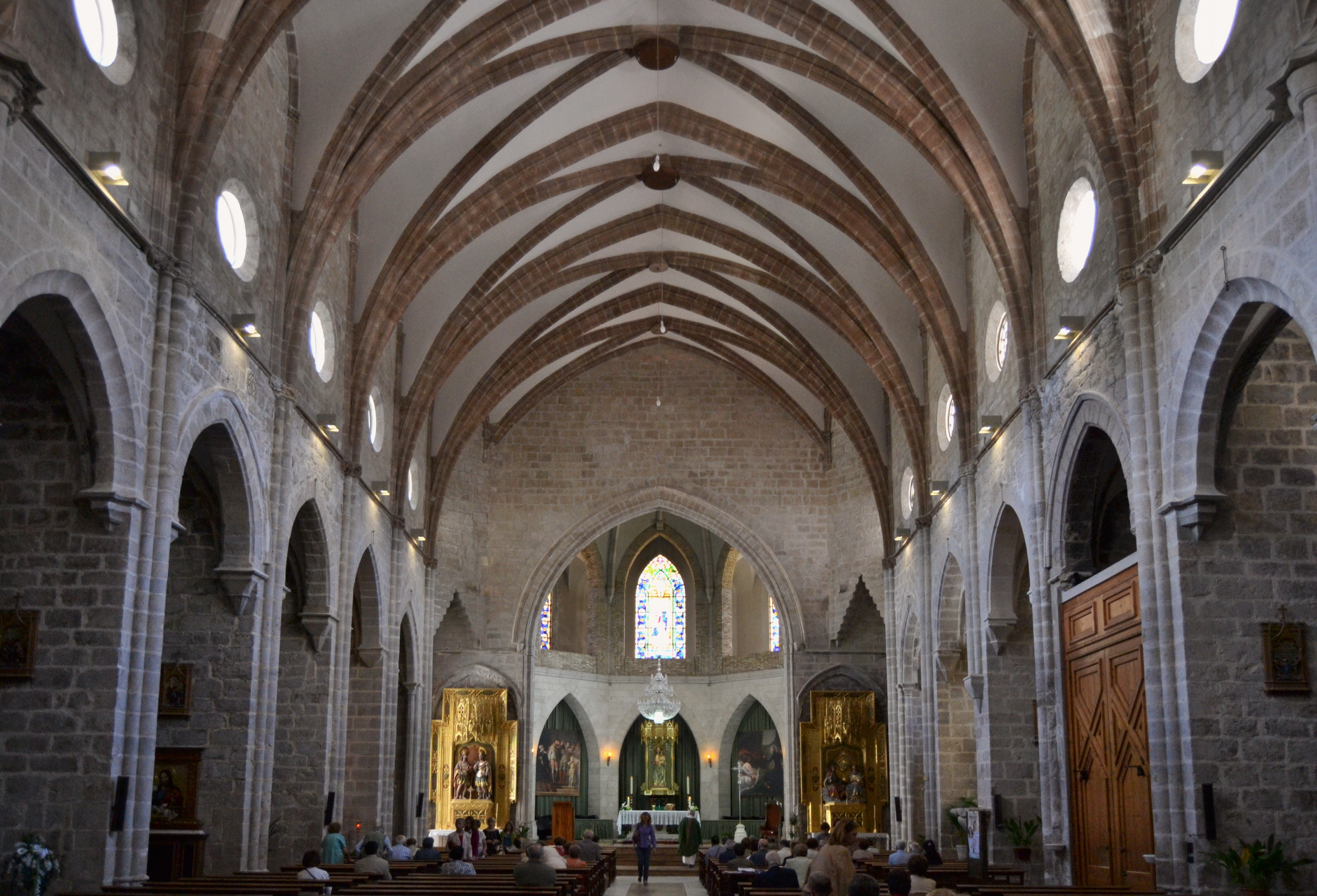 Col·legiata de Gandia, interior.